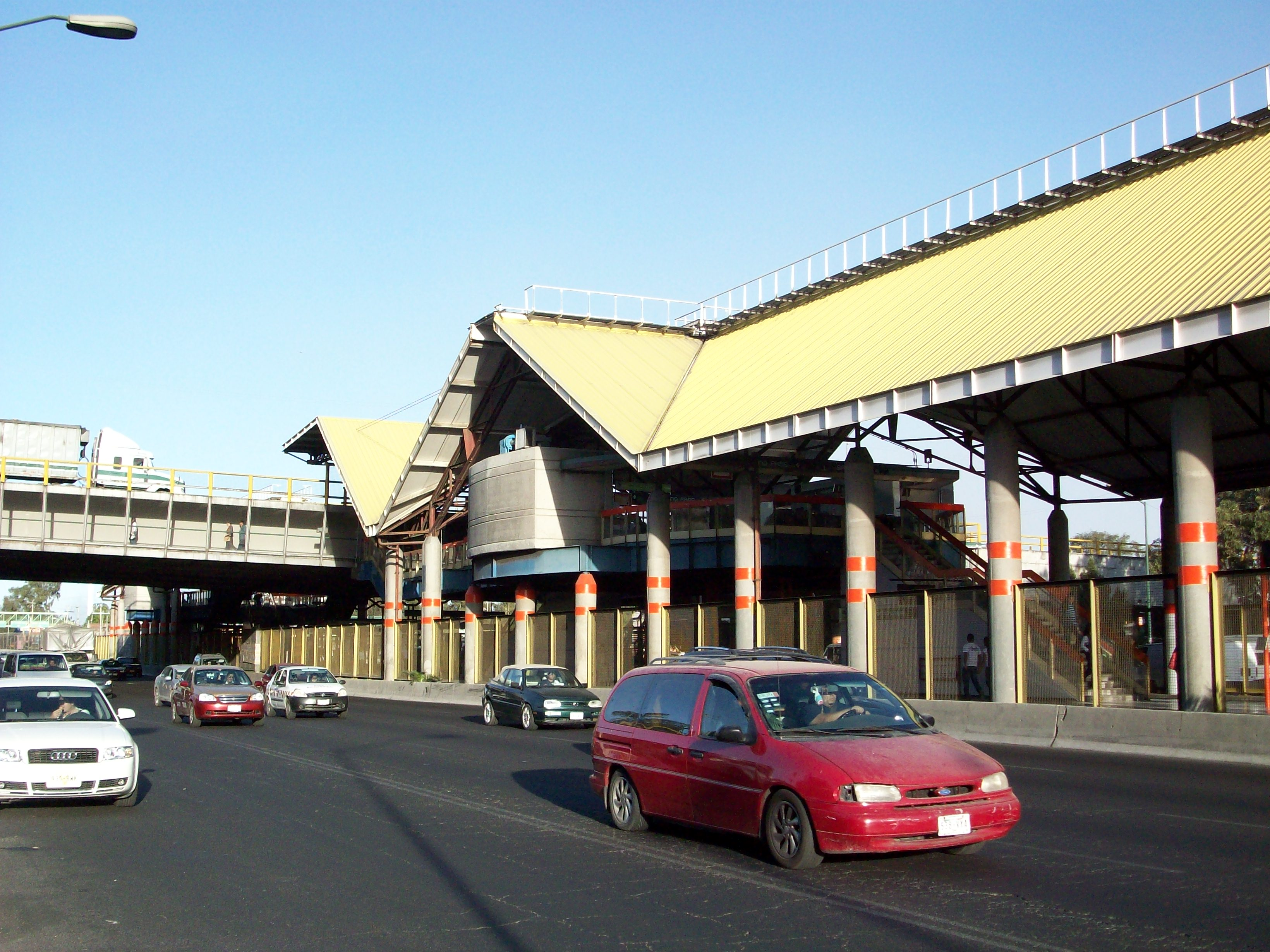 Edificio de la estación Deportivo Oceanía